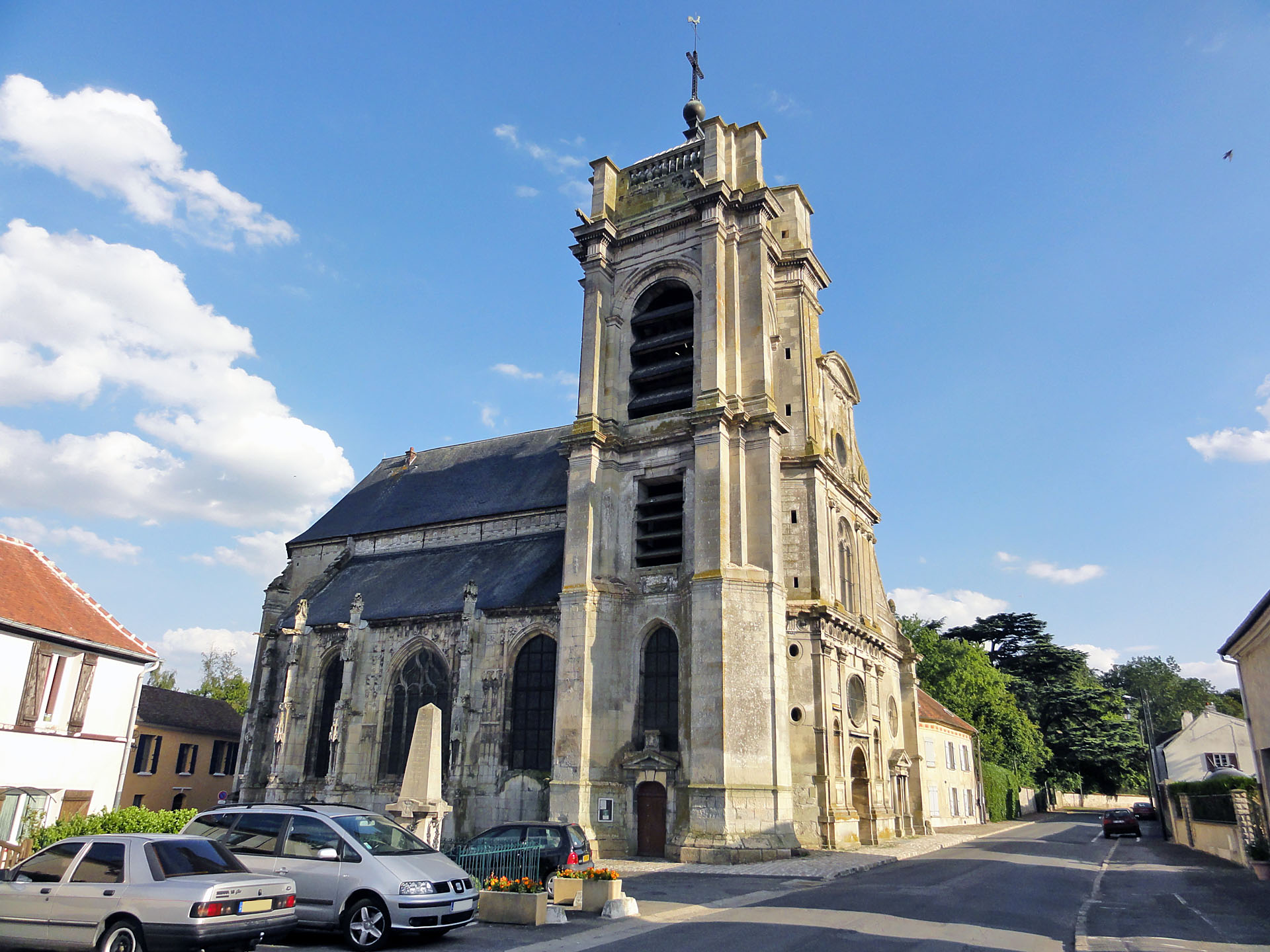 L'église Notre-Dame au Mesnil-Aubry, Val-d'Oise, France.